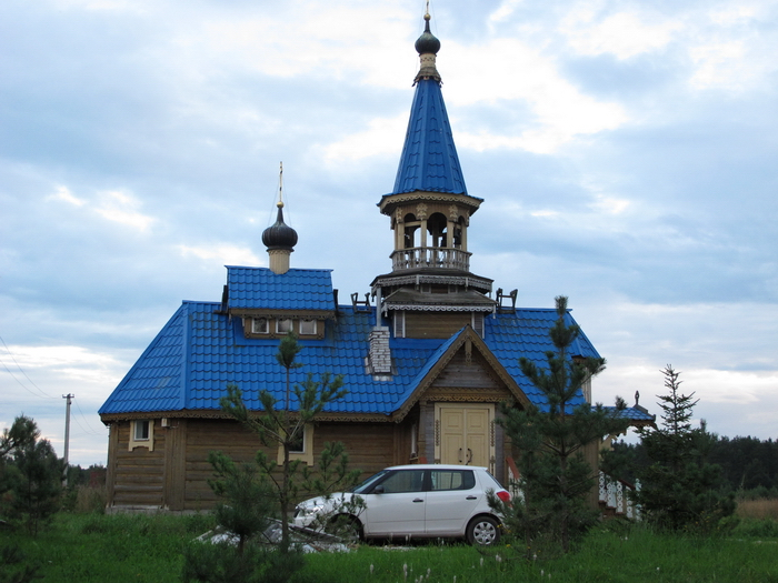 Церковь Рождества Пресвятой Богородицы